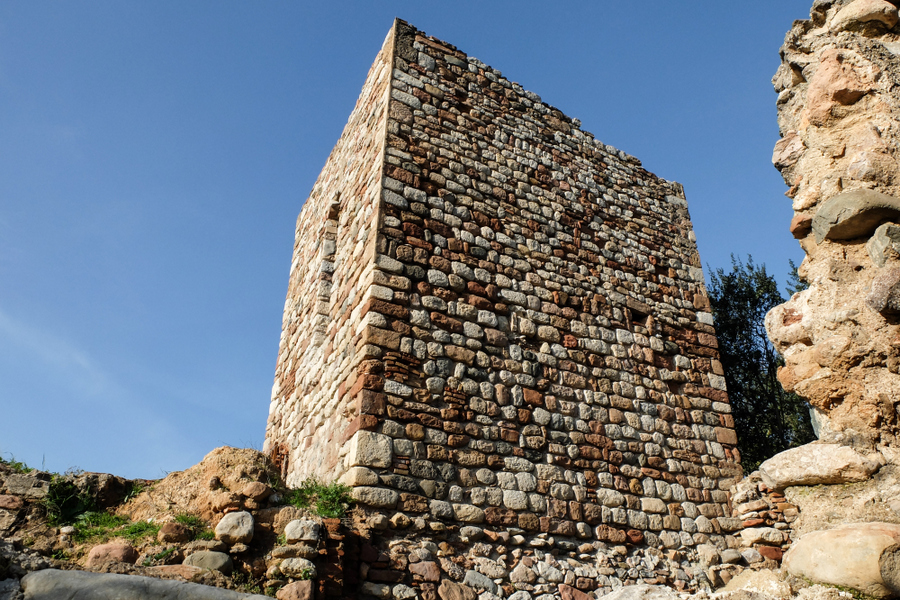 Torre de Ca N'Altimira, a la comarca del Vallès Occidental, Catalunya